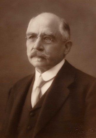 Ferdinand Czeiczner (1850-1932), německý průmyslník a komunální politik